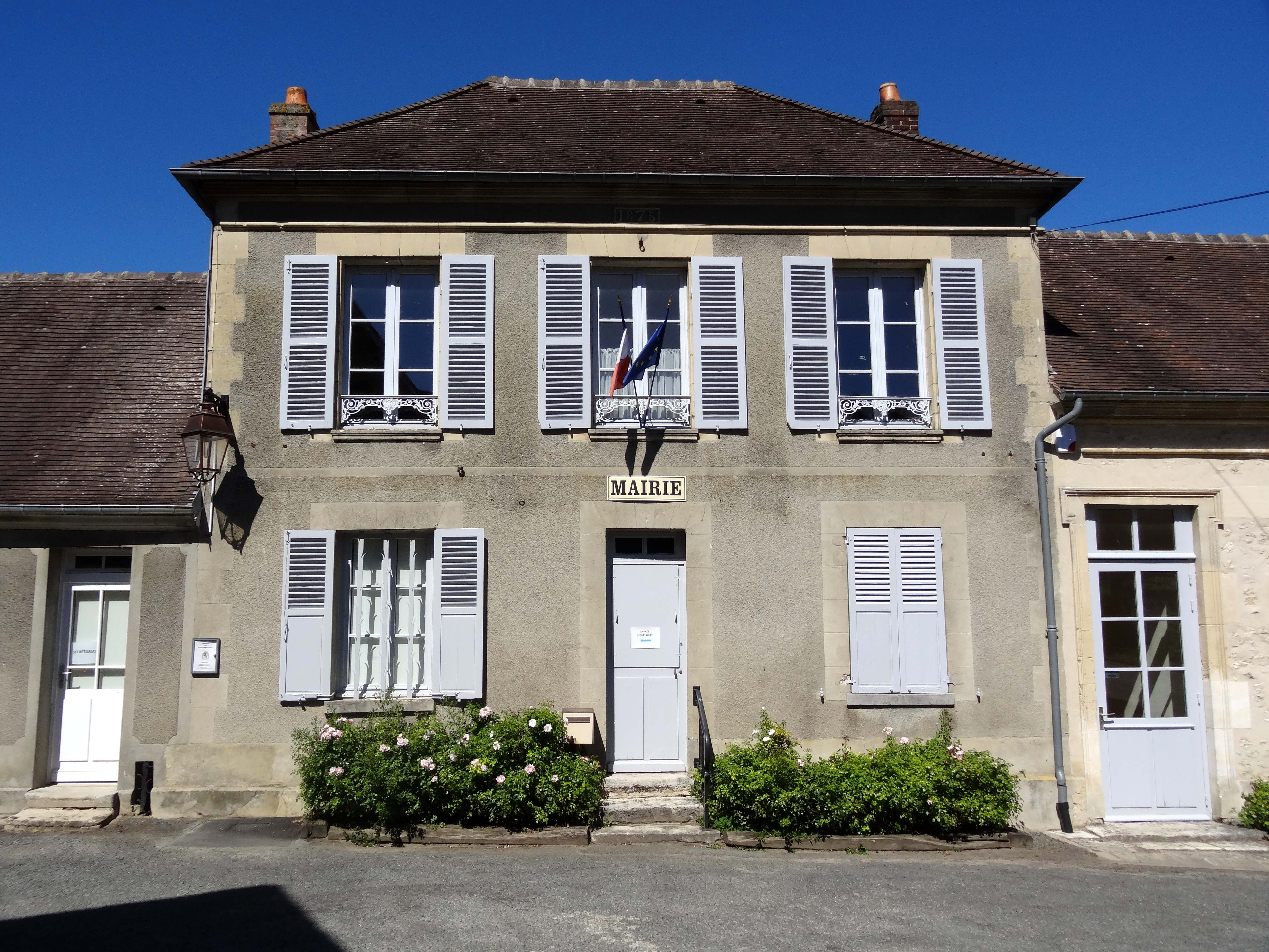 Vaudancourt - voir titre.